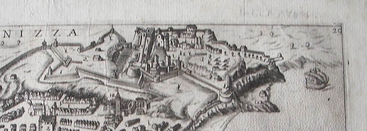 Plan des fortifications de la citadelle et du château de Nice en 1625.